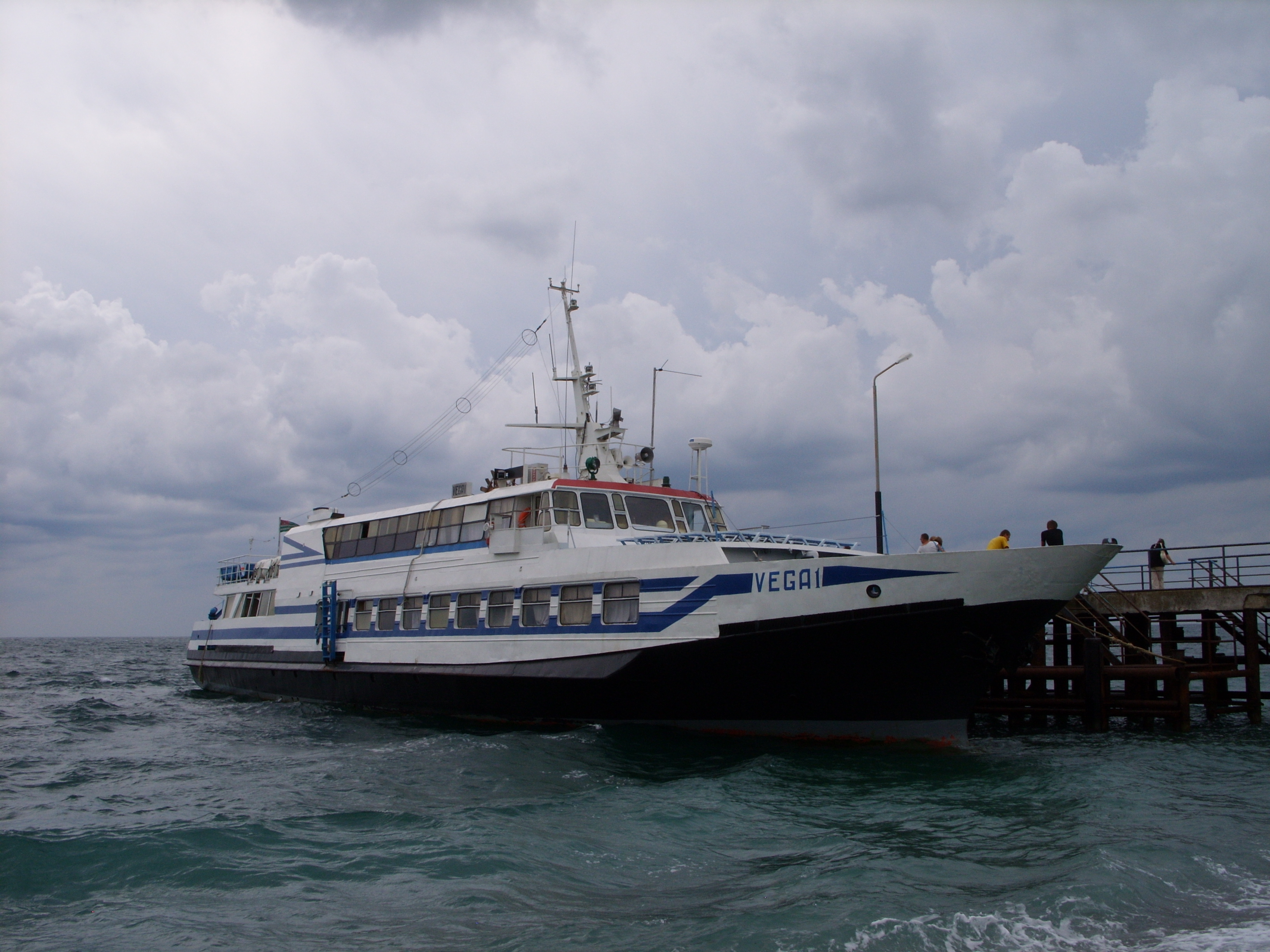 Снимок июля 2009 г. Автобусная экскурсия из Сочи